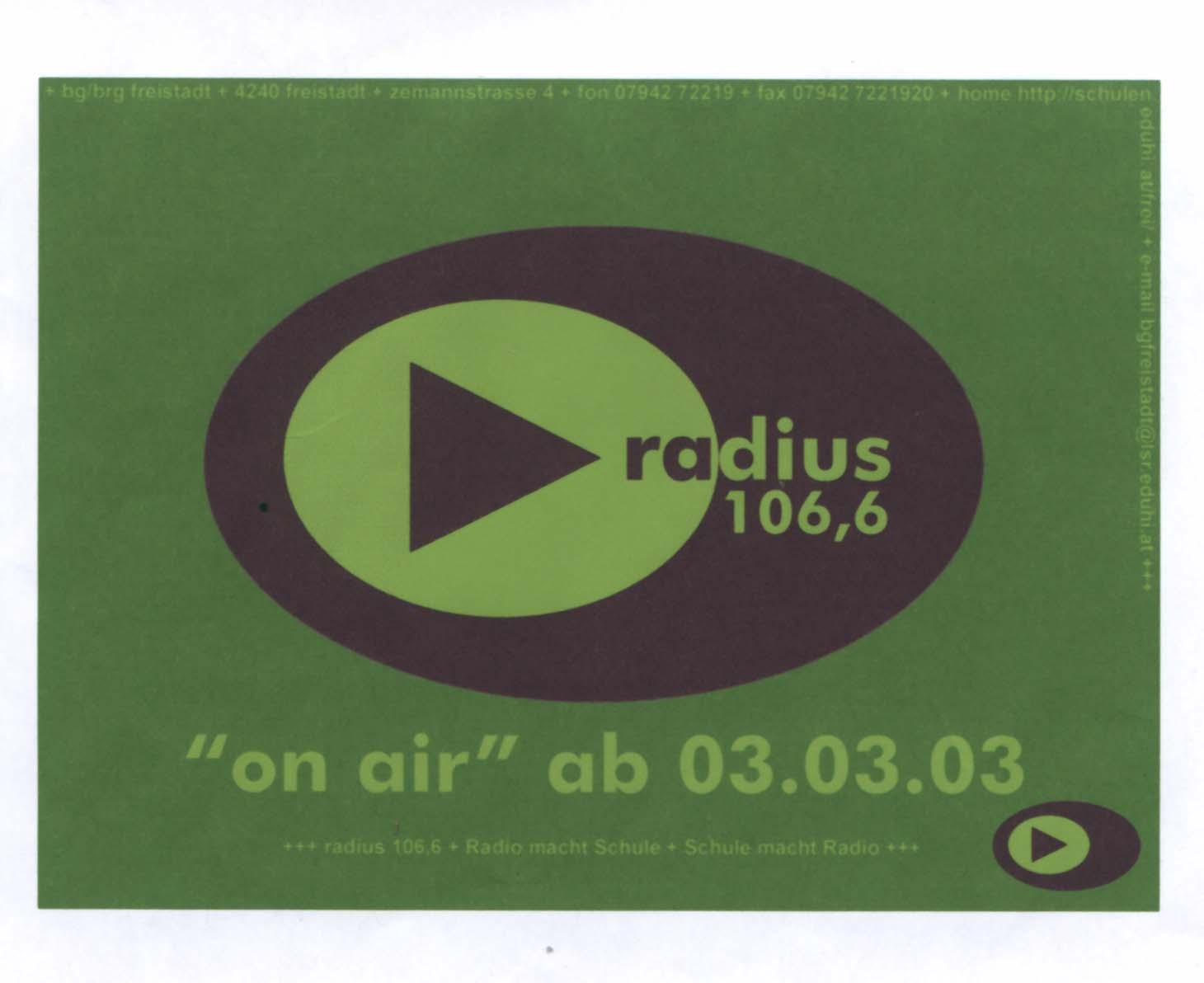 RADIUS 106,6 - On Air ab 03.03.2003